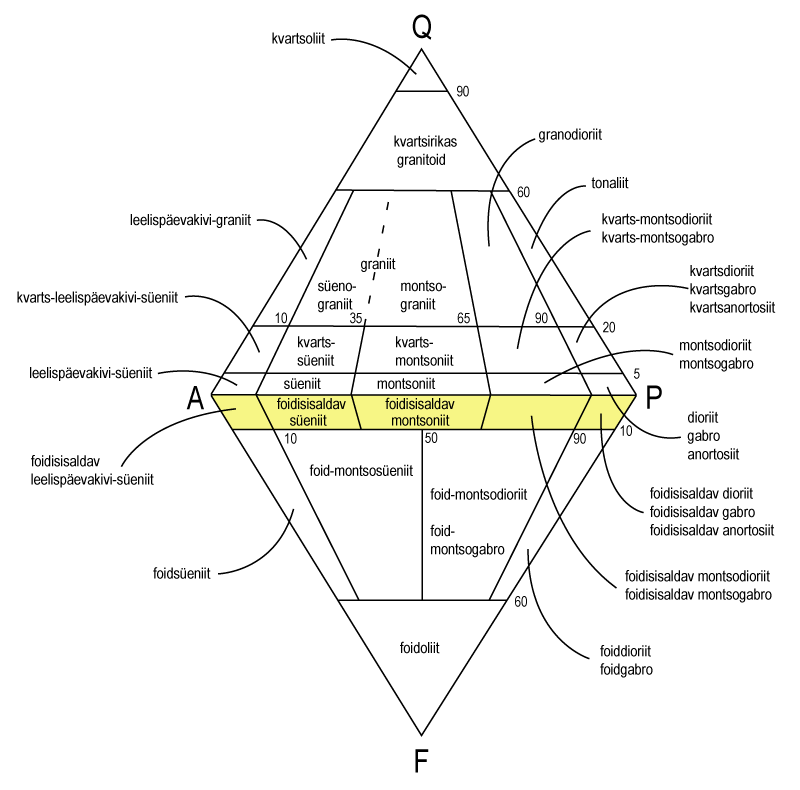 Süvakivimite QAPF-diagramm, millel on esiletõstetud foidisisaldavad kivimid